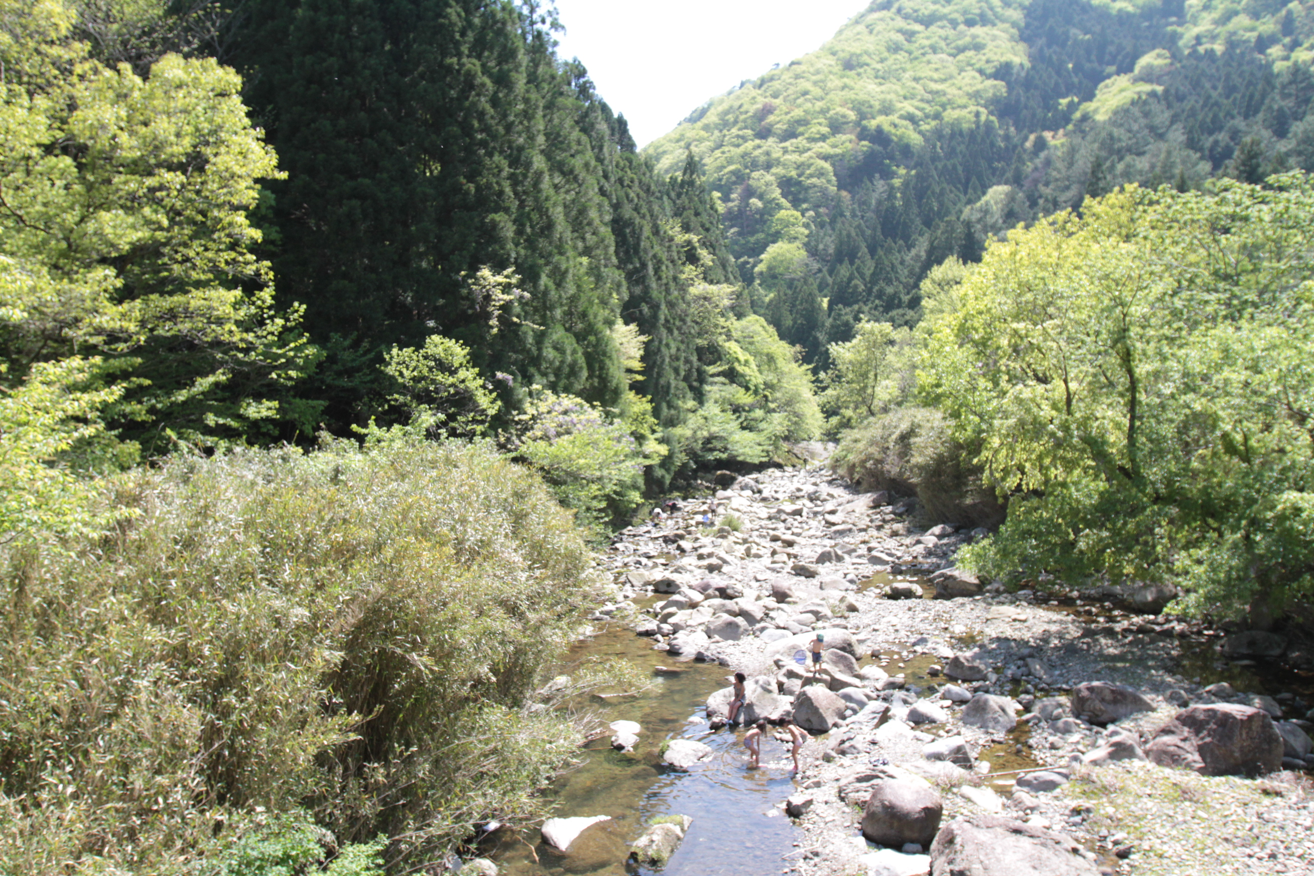 hatsukagawa